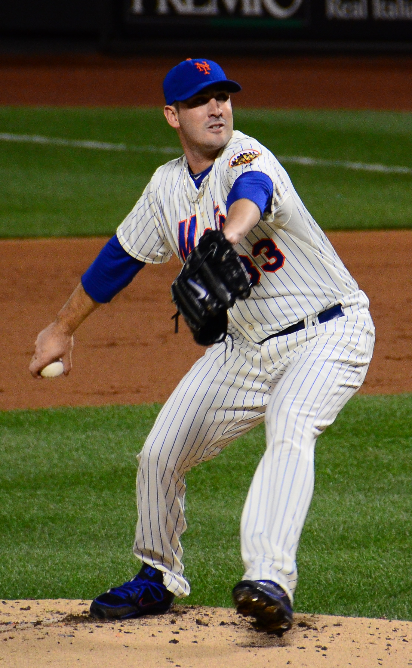 Matt Harvey